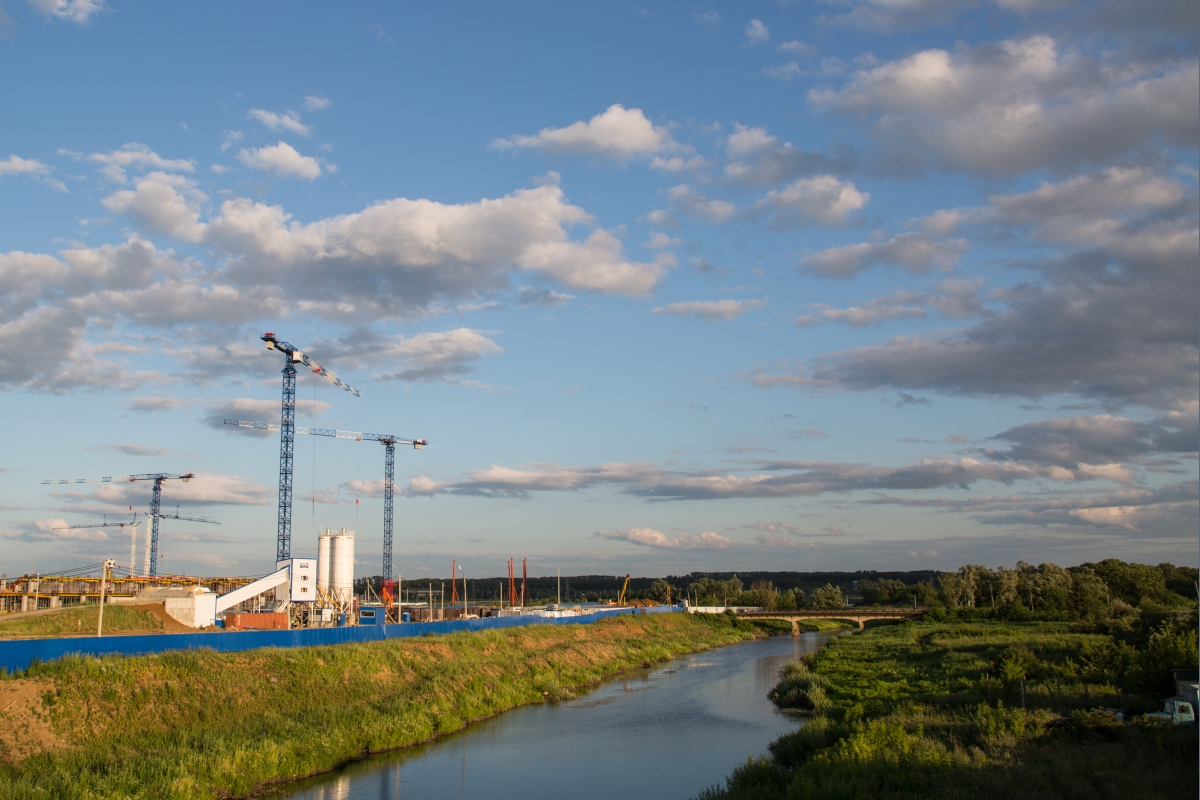 Мост, открытый в честь 100-летия победы России наднаполеоновскими войсками: улица Советская, Саранск, Мордовия